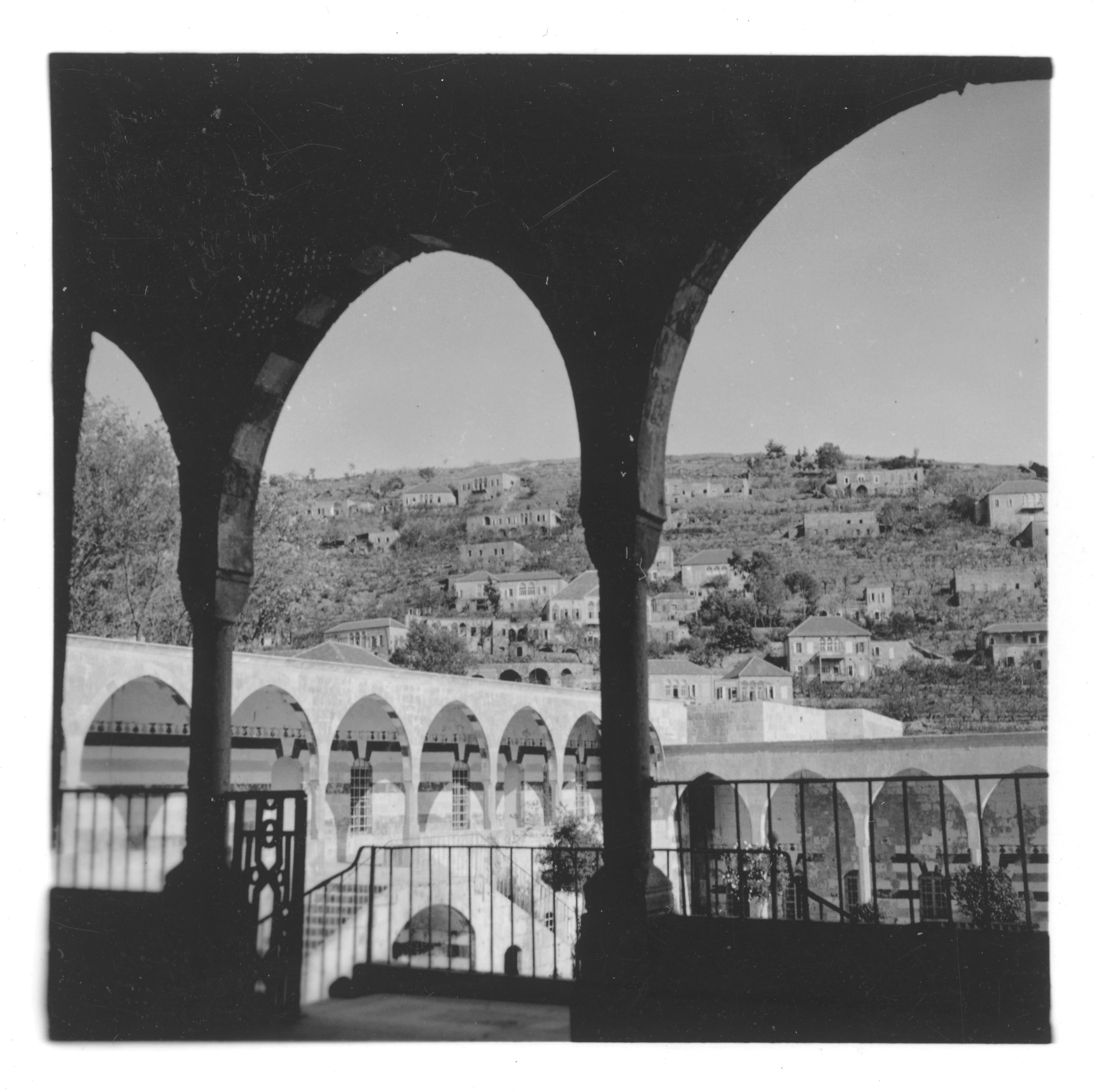 Libanon, Beid-eddin (Beit ed Din, Beiteddin): Palast; Blick vom Palast auf Hügel mit Häusern